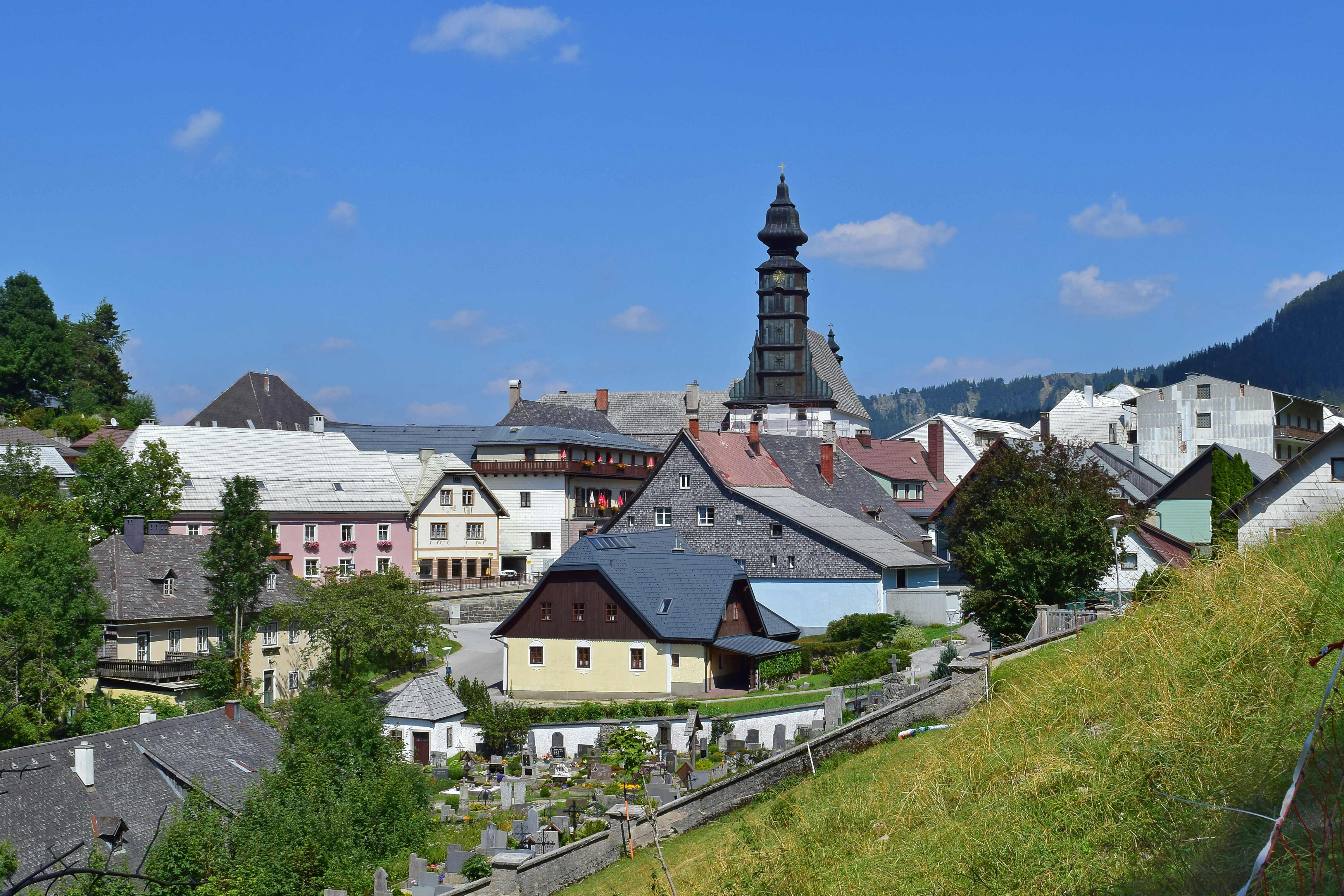 Ortsansicht von Annaberg